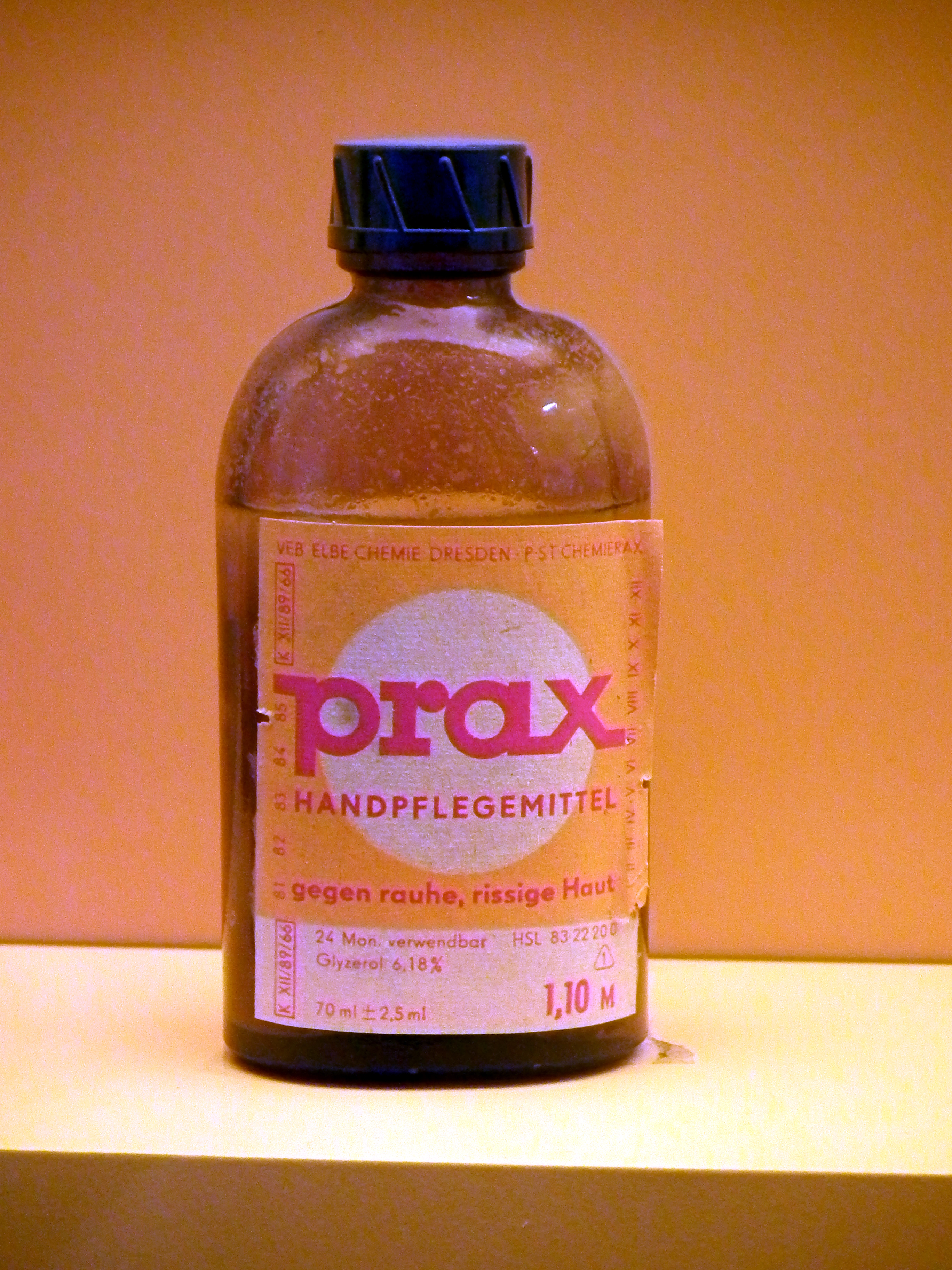 Prax Handpflegemittel, VEB Elbe Chemie Dresden (Betriebsteil Chemierax Radebeul), aufgenommen im Nudelmuseum Riesa